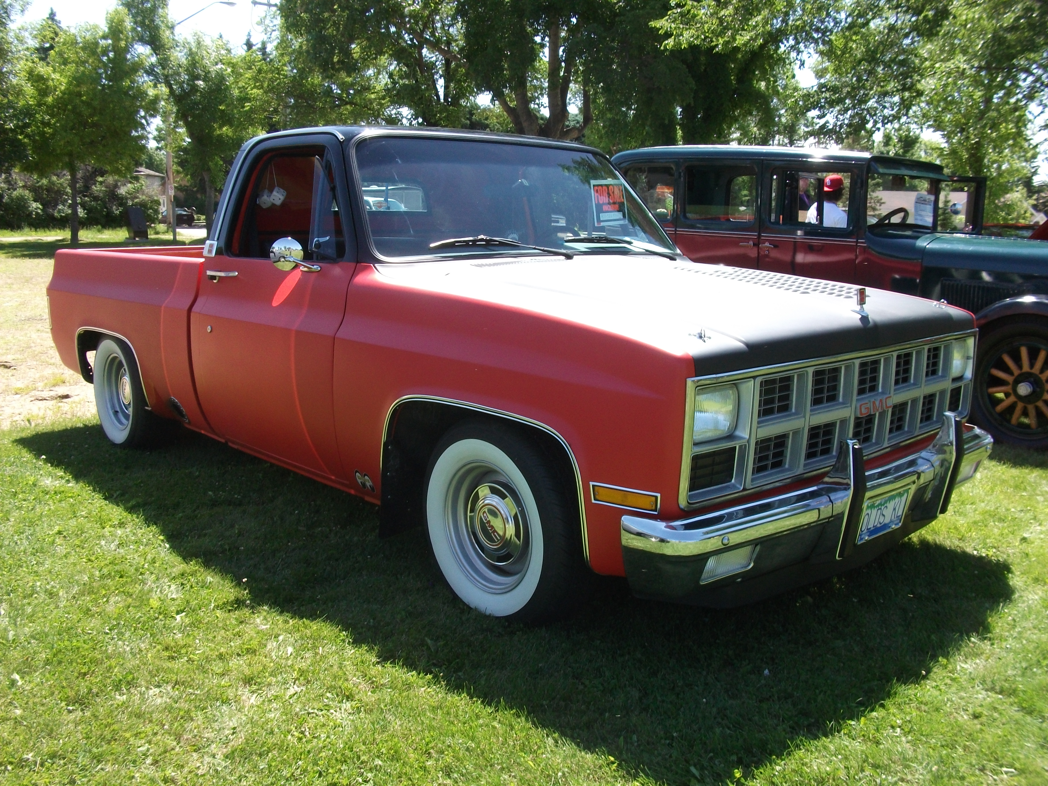 1981 GMC Sierra